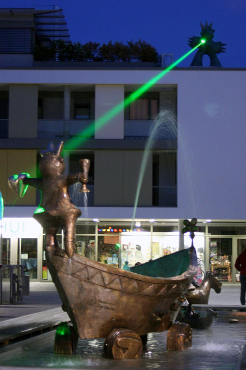 Platzgestaltung in Ingelheim am Rhein aus einer Gruppe von 6 Bronzen, Wasser und Laser